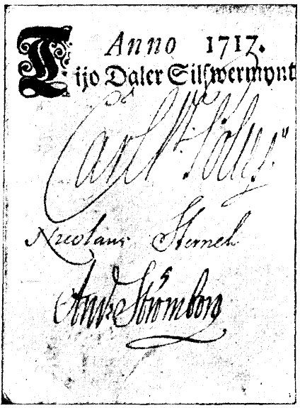 Myntsedel 10 daler smt från 1717